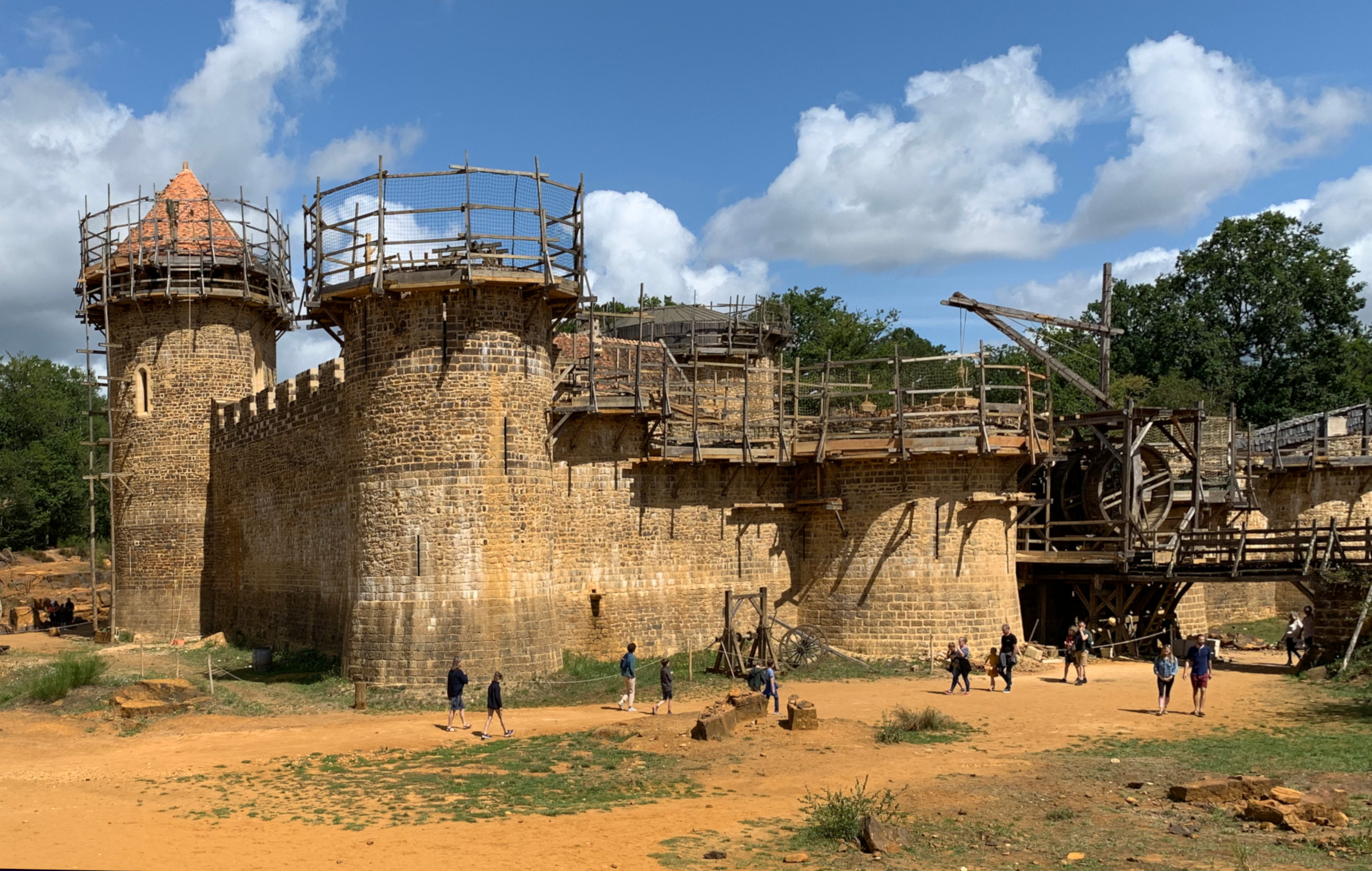 Le château du Guédelon (Treigny, France) le 19 août 2019.